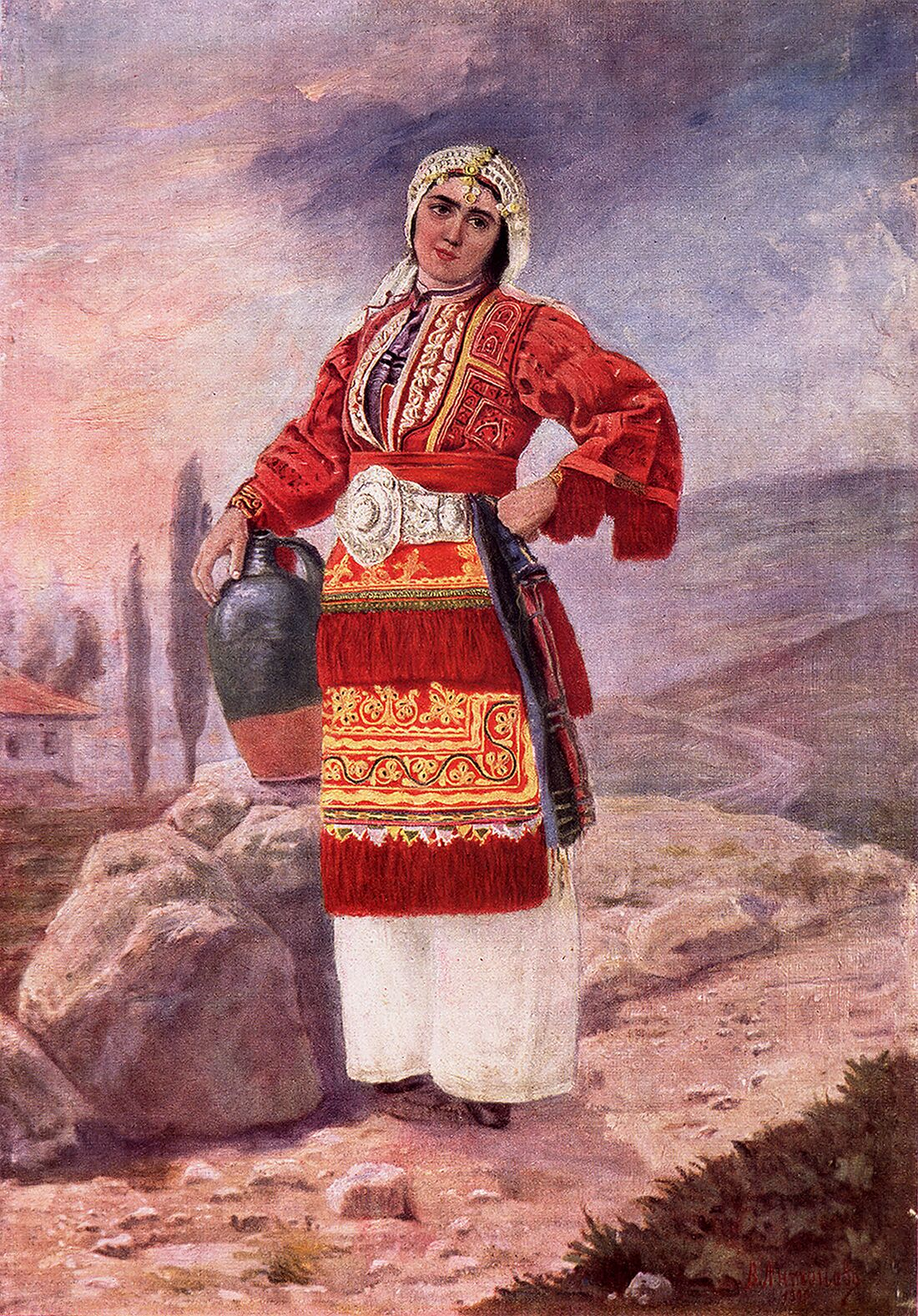 "Bulgarin in Westmazedonien", 1906